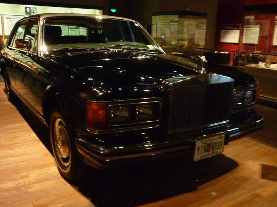 应昌期先生拥有的劳斯莱斯轿车